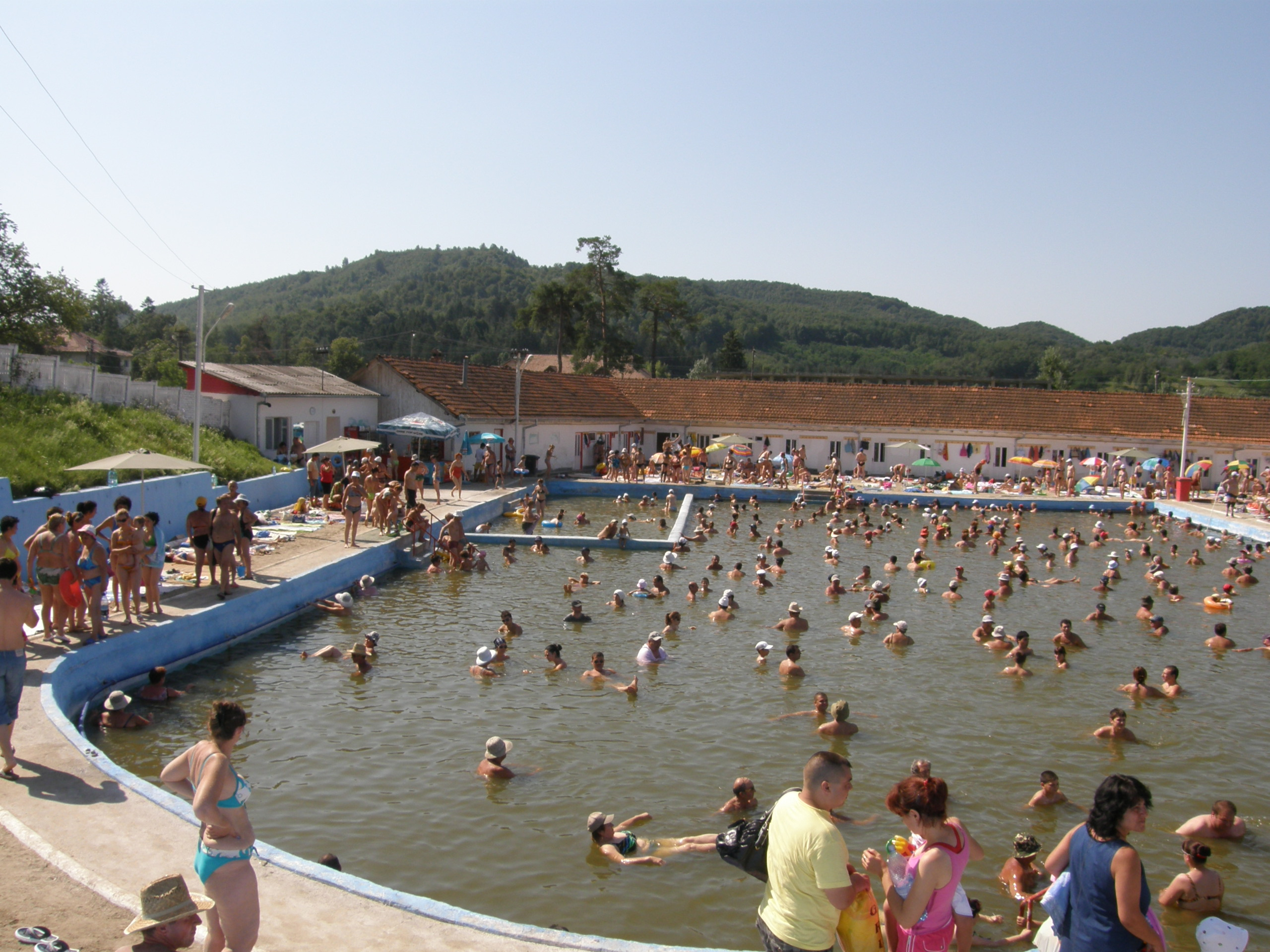 Stabilimentul băilor (sf. sec. XIX) Ocnele Mari Ramnicu Valcea